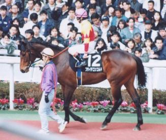 フサイチコンコルド（1996年3月9日、阪神競馬場で撮影、撮影者本人）